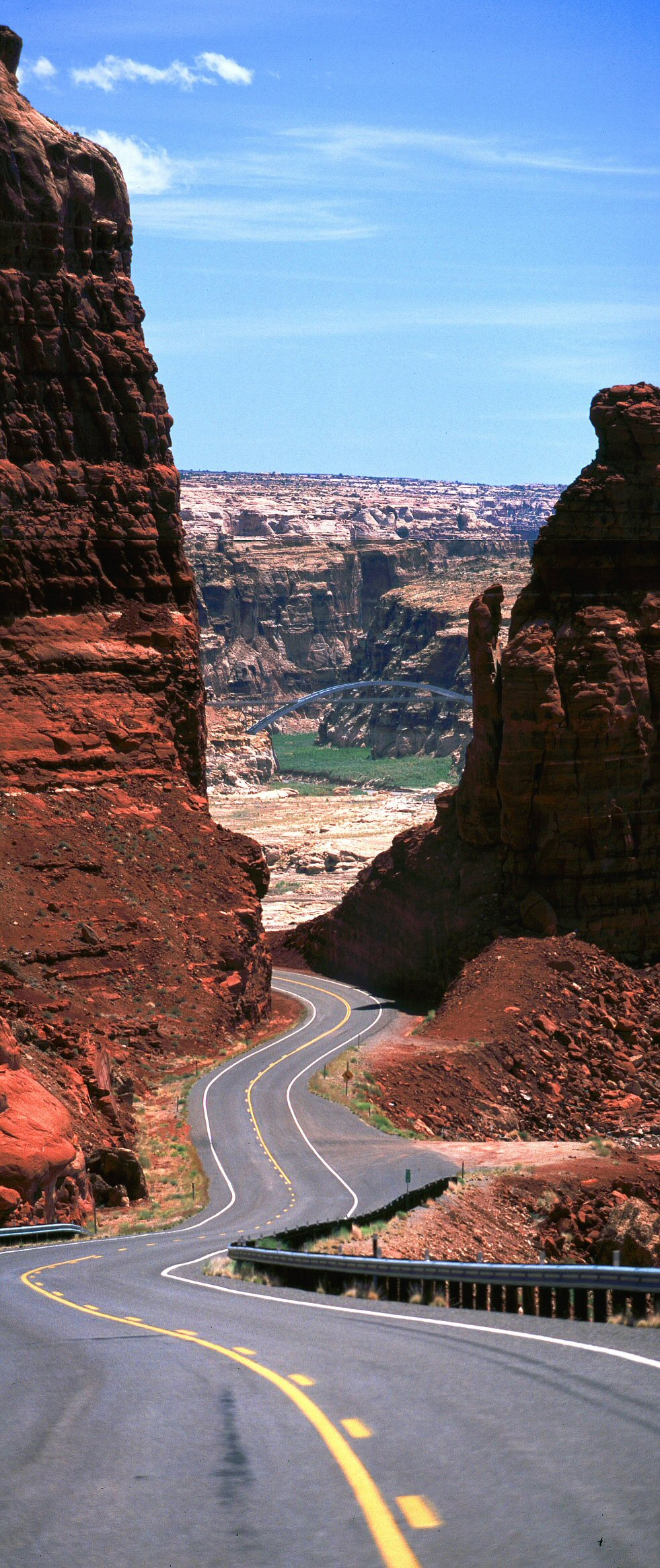 Utah State Highway 95 (Bicentennial Highway) Hite Crossing Bridge, Glen Canyon National Recreation Area, USA 2004 Noch einmal der Blick auf die Hite Crossing Bridge aus einer anderen Perspektive. Aufnahmedaten und digitale Bearbeitung wie im Bild "Hite Crossing Bridge", die drei Einzelbilder wurden mit der Software Panorama Maker 3 gestiched.